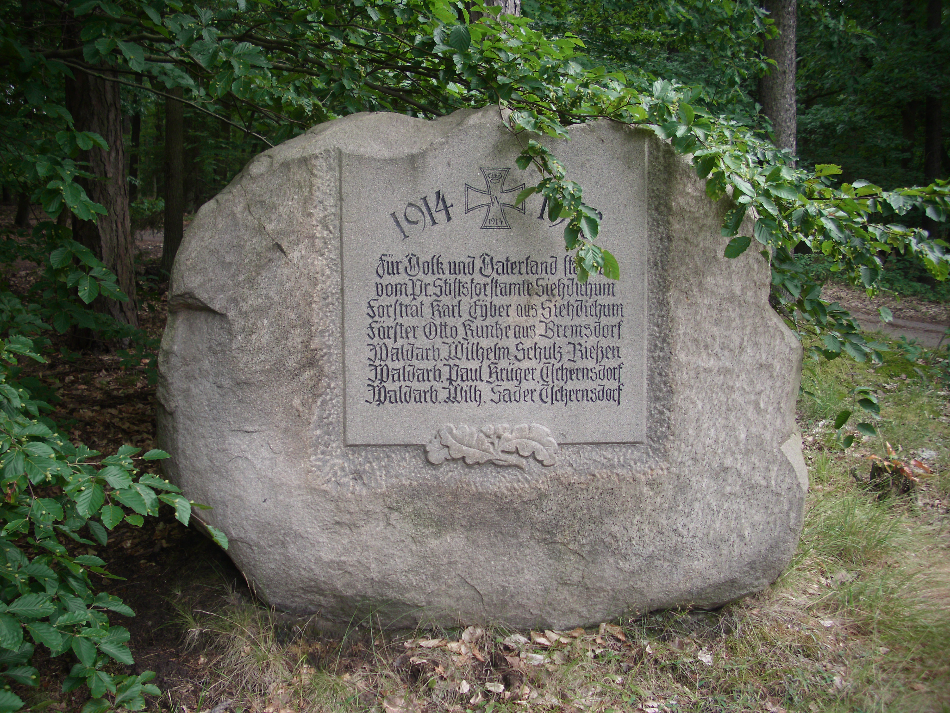 Denkmal der Gefallenen des Ersten Weltkrieges von Siehdichum, Naturpark Schlaubetal, Brandenburg